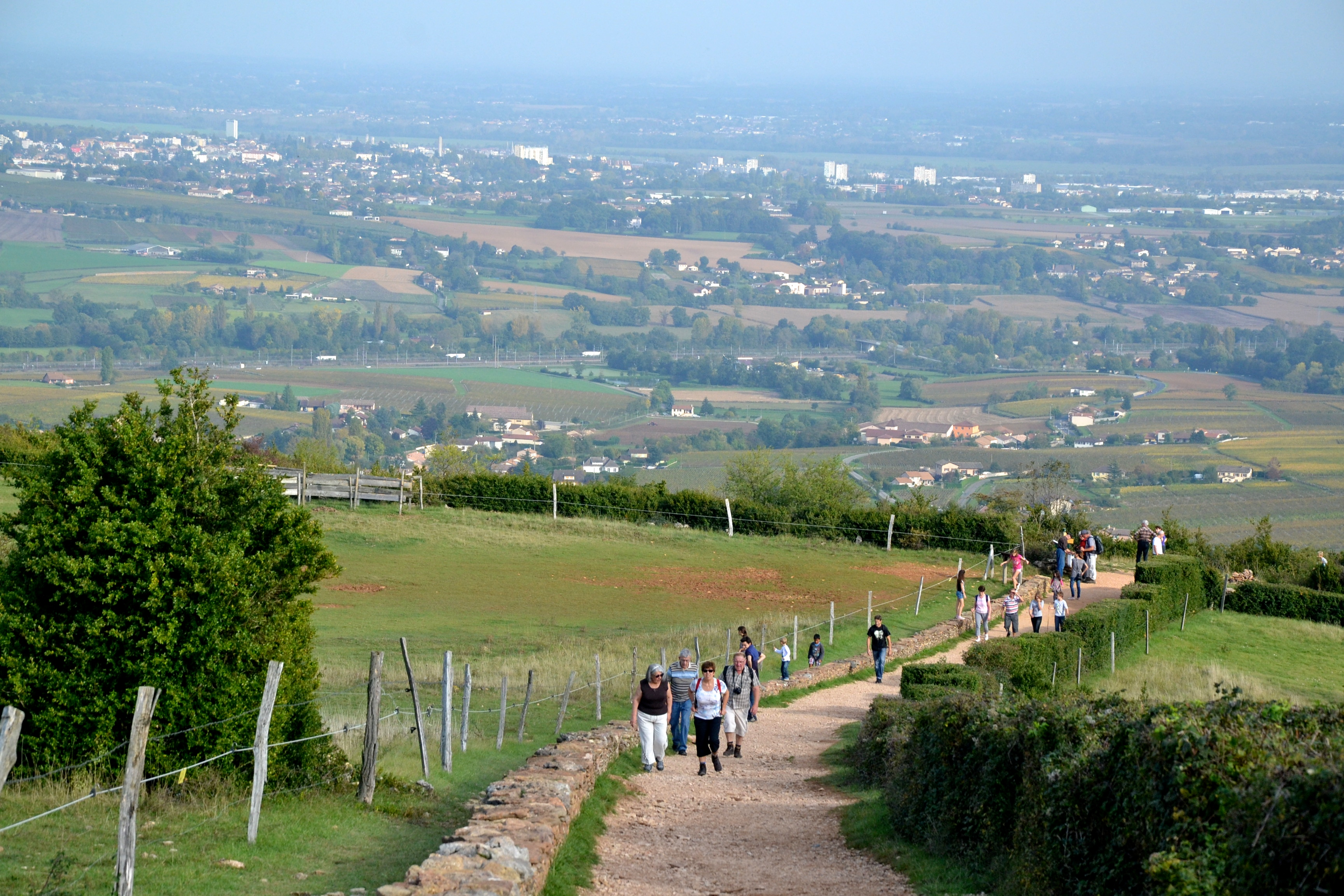 Vue sur la vallée de la Saône depuis la roche de Solutré (Saône-et-Loire, France).